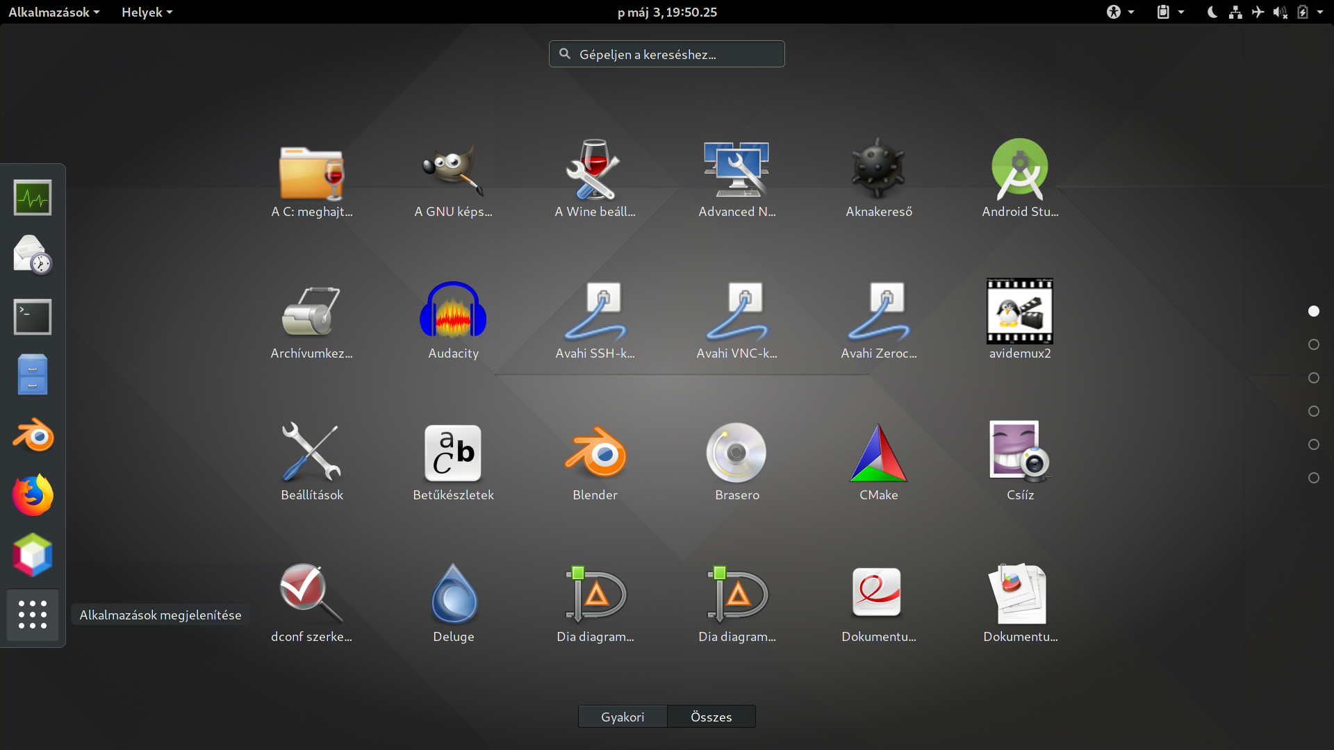 Gnome v3.24 asztal, alkalmazás-kereső